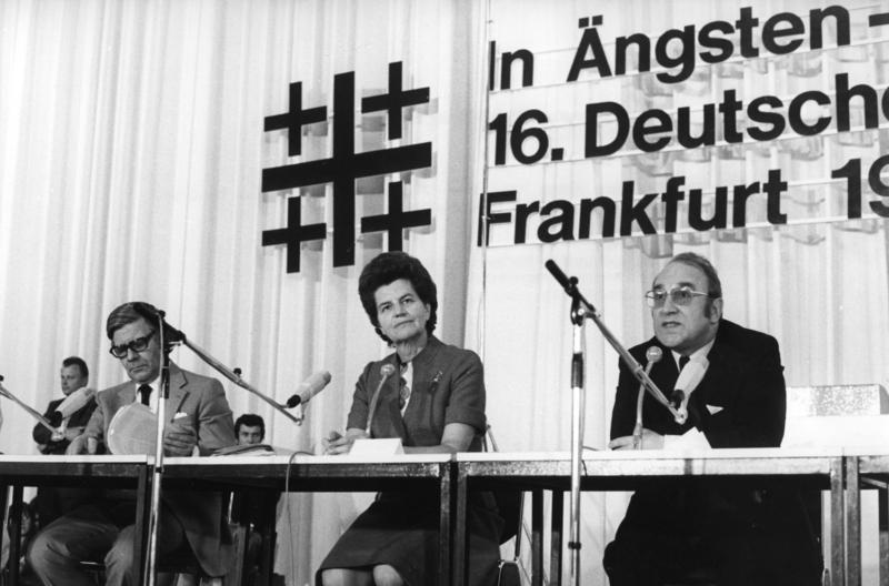 11.-15. Juni 1975 16. Deutscher Evangelischer Kirchentag in Frankfurt/Main Podiumsdiskussion zum Thema "Macht und Ohnmacht der Kirche in der Gesellschaft" am 13.6. in der Kongreßhalle Das Bild zeigt von links: Bundeskanzler Helmut Schmidt Bundestagsvitzepräsidentin Lieselotte Funcke Chefredakteur Eberhard Maseberg